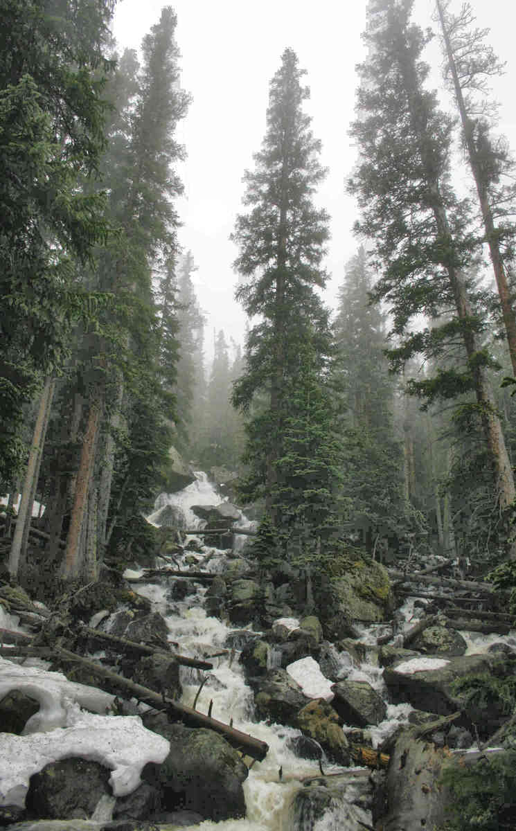 Calypso Cascades